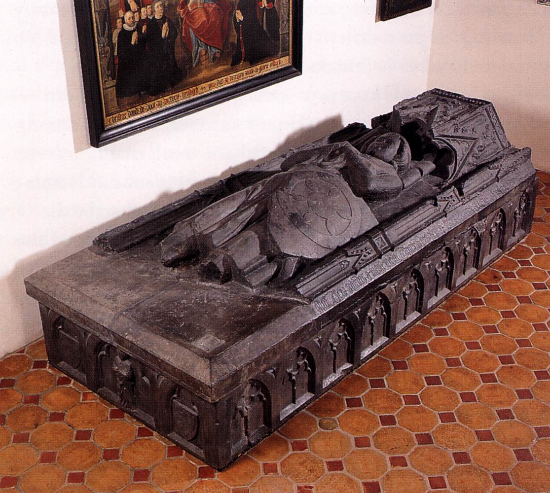 Graftombe Ridder Arnold van der Sluijs, afkomstig uit de abdij van Berne. Graftombe Van der Sluijs hier in het Catharijneconvent in Utrecht.